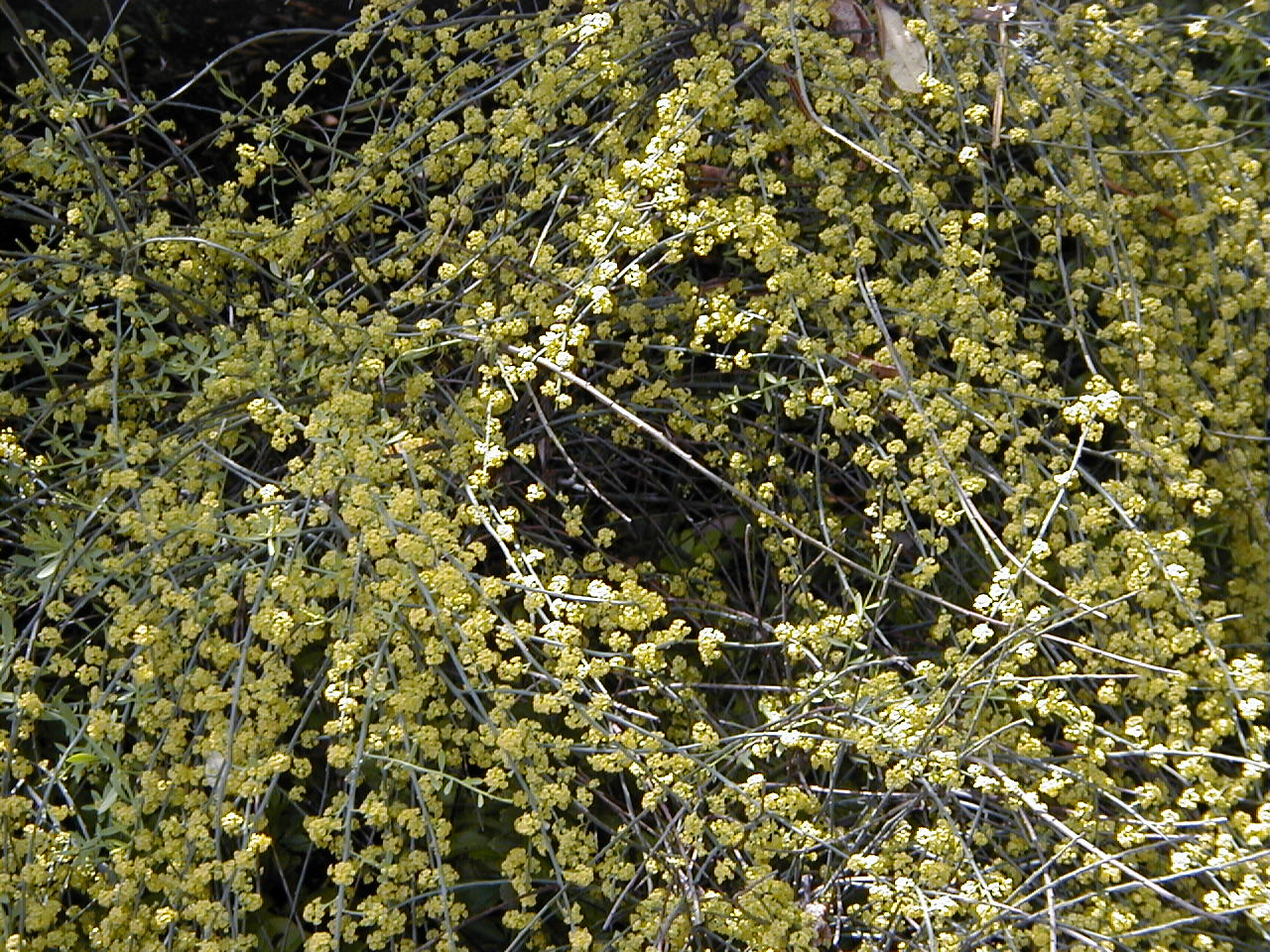 Osyris alba. Real Jardín Botánico, Madrid.